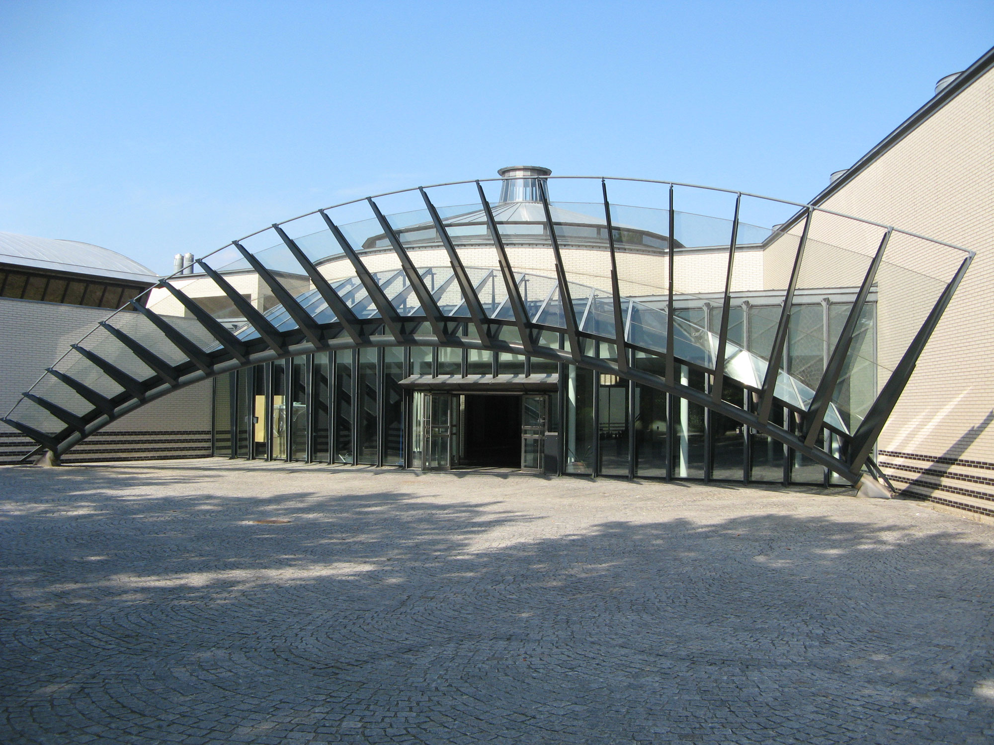 Kantonsschule Wohlen, Haupteingang (Gestaltung durch Santiago Calatrava)